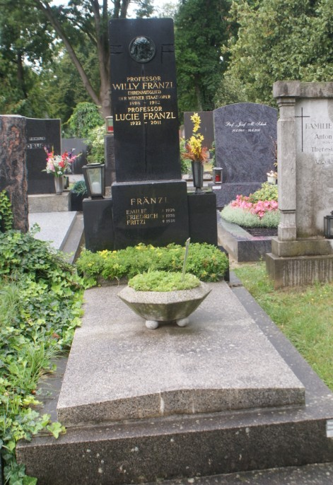 WillyFränzl-Wiener Zentralfriedhof